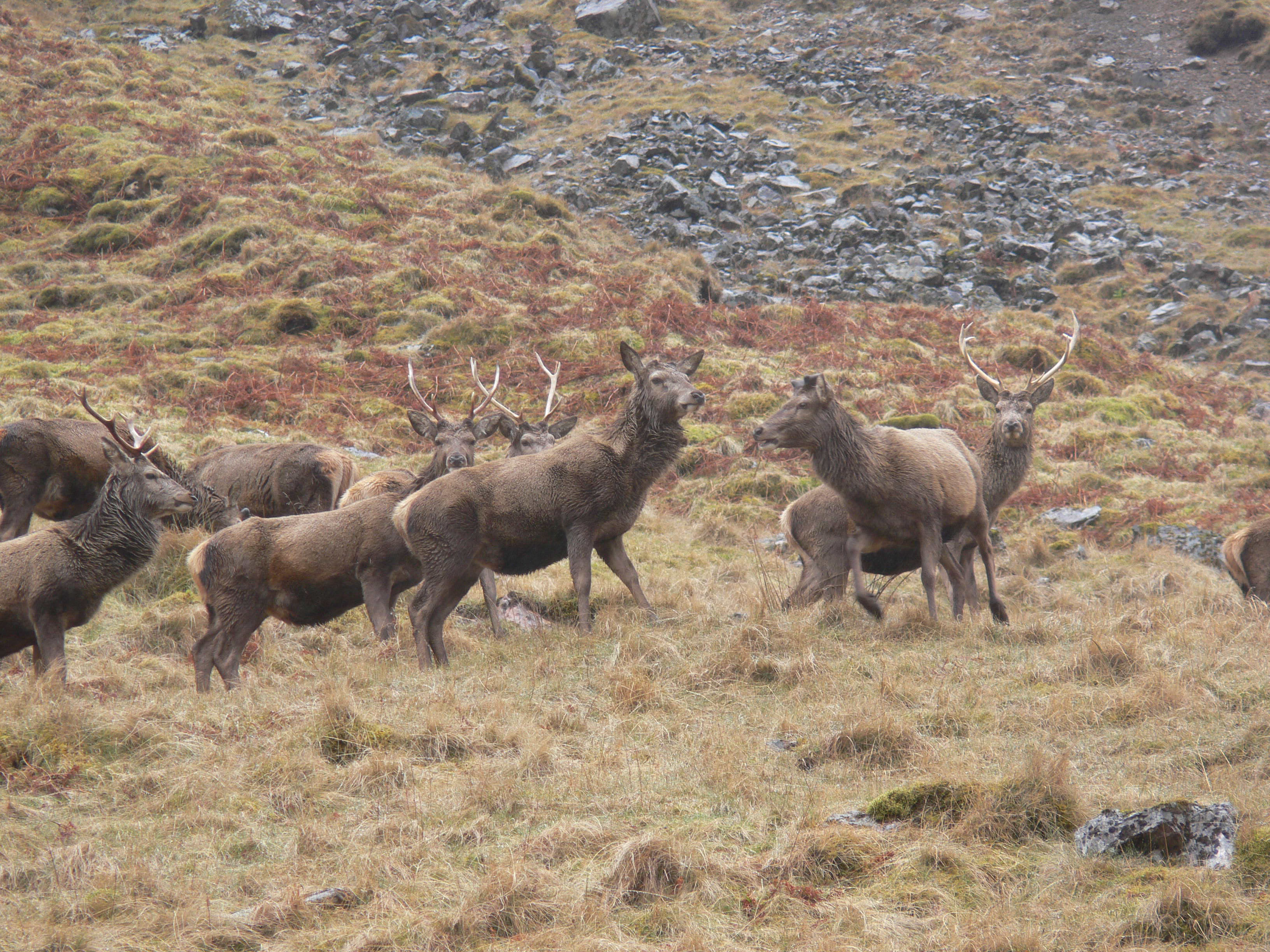 Red deer in Glencoe